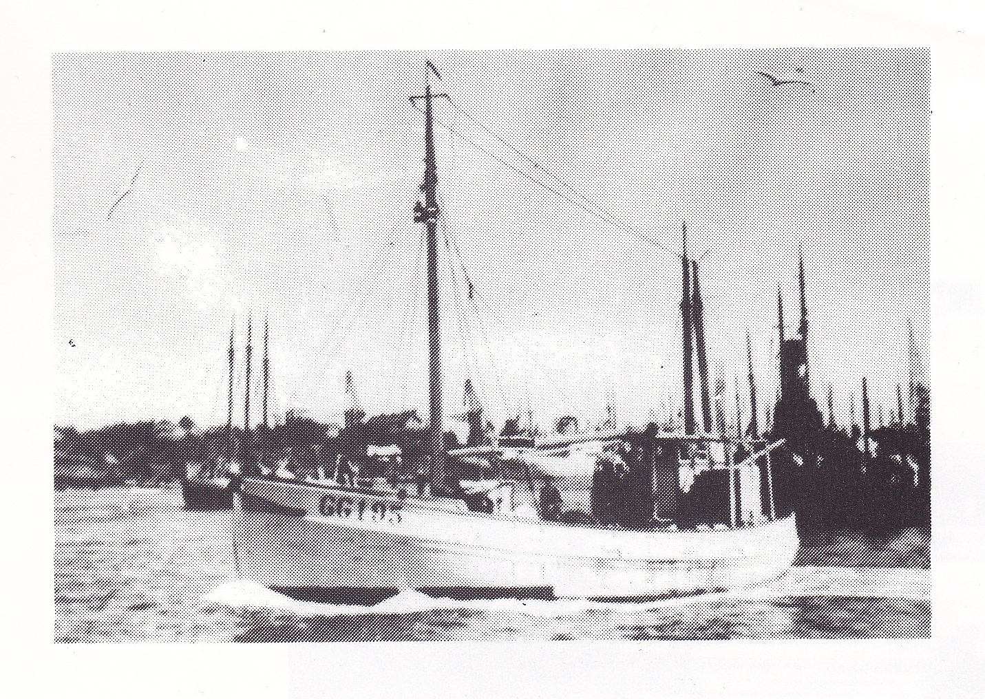 Fiskebåten GG 195 Normy från Hälsö som hittade den minsprängda u-båten Ulven på position latitud nord 57 grader 45,05 minuter och longitud ost 11 grader 26,8 minuter, den 5 maj 1943 efter tre veckors intensivt sökande sydväst Stora Pölsan i Göteborgs norra skärgård.